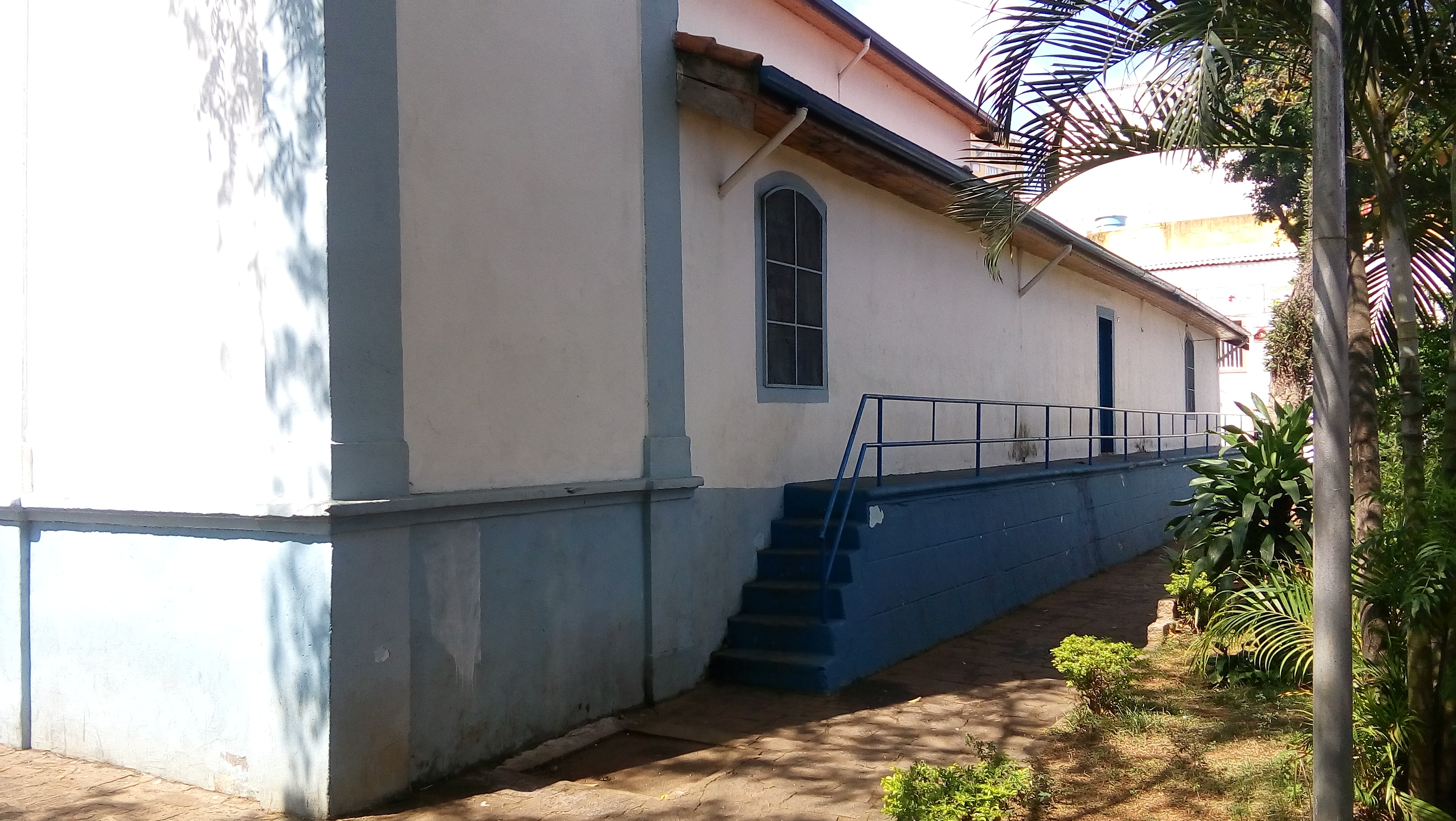 Lateral da Igreja do Rosário dos Homens Pretos da Penha, em São Paulo (SP), Brasil